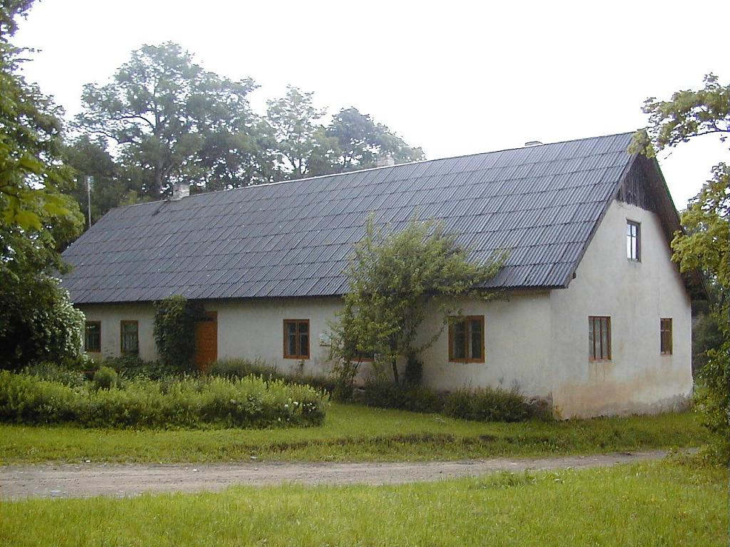 Sausnēja, rakstnieka Valda muzejs 2002-06-22